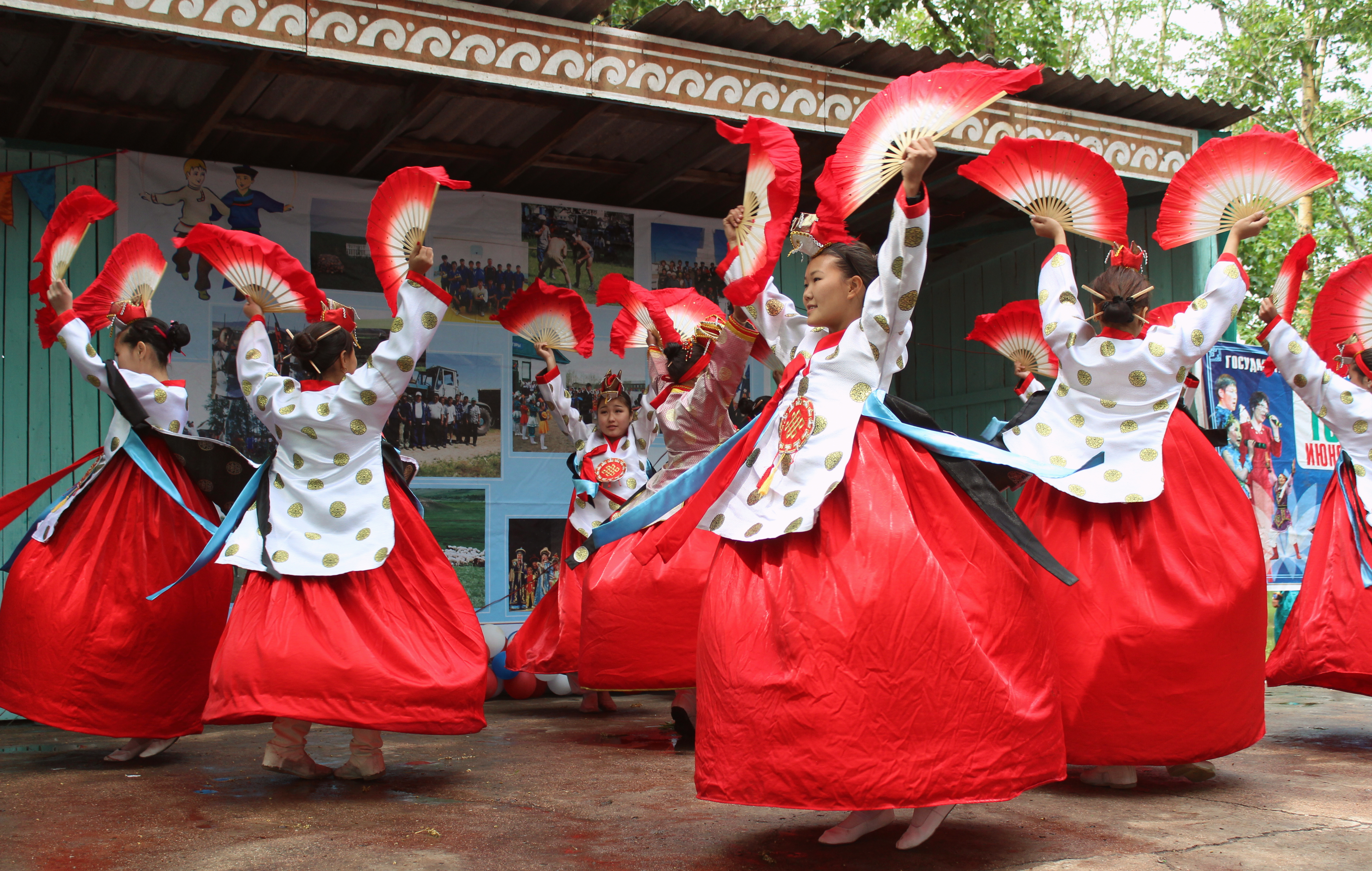 Детский фольклорный ансамбль "Ая-ганга". Село Дэдэ-Ичётуй, Джидинский район, Бурятия